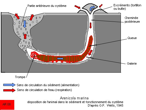 Arenicola marina. Disposition de l'animal dans les sédiment et fonctionnement du système. La profondeur est réduite par rapport à la largeur.